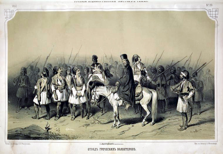 Отряд греческих волонтеров. Русский художественный листок, №29, 1855